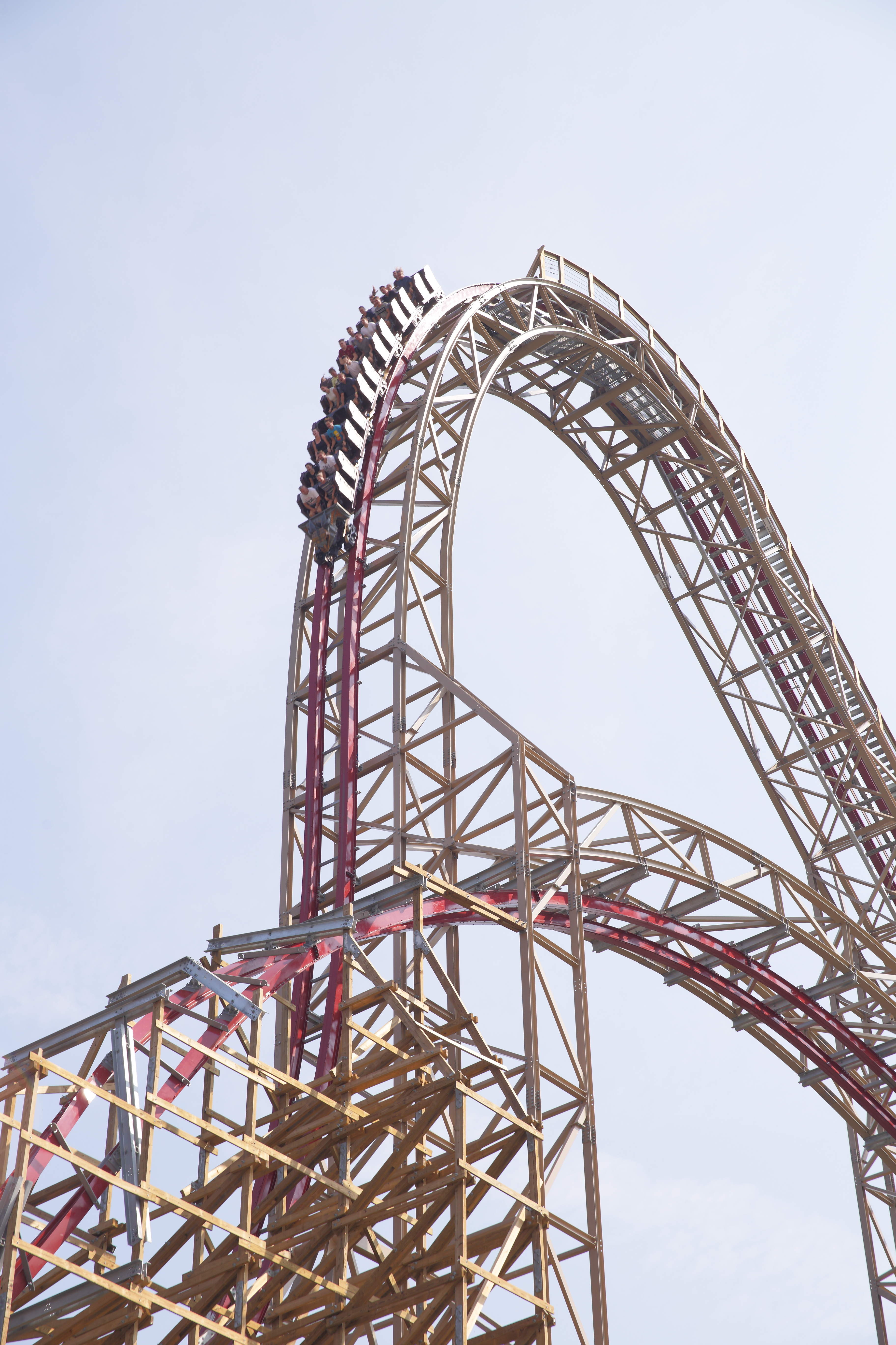 Pierwszy spadek hybrydowej kolejki górskiej Zadra w parku Energylandia w Polsce.